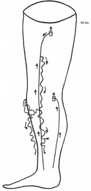 Cartografia venosa com projecto de cirurgia Cura CHIVA I+II